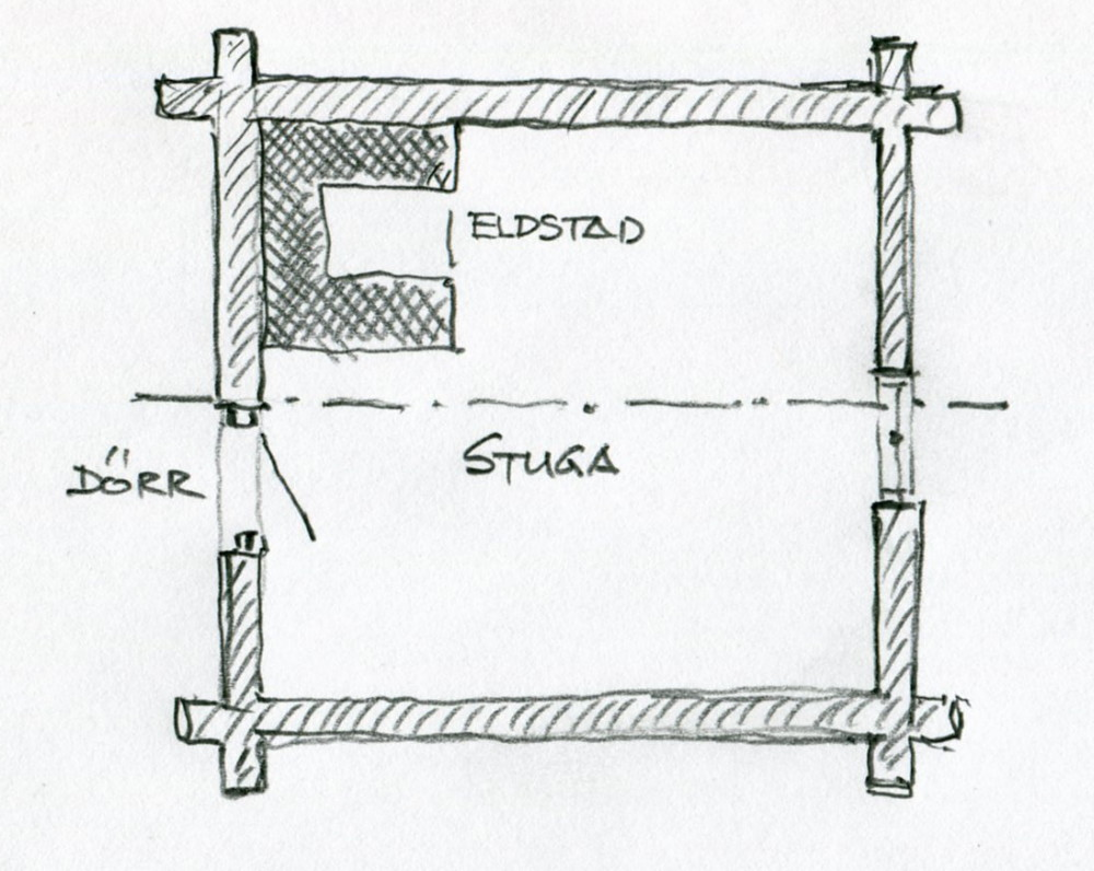 Planritning för en svensk enrumsstuga